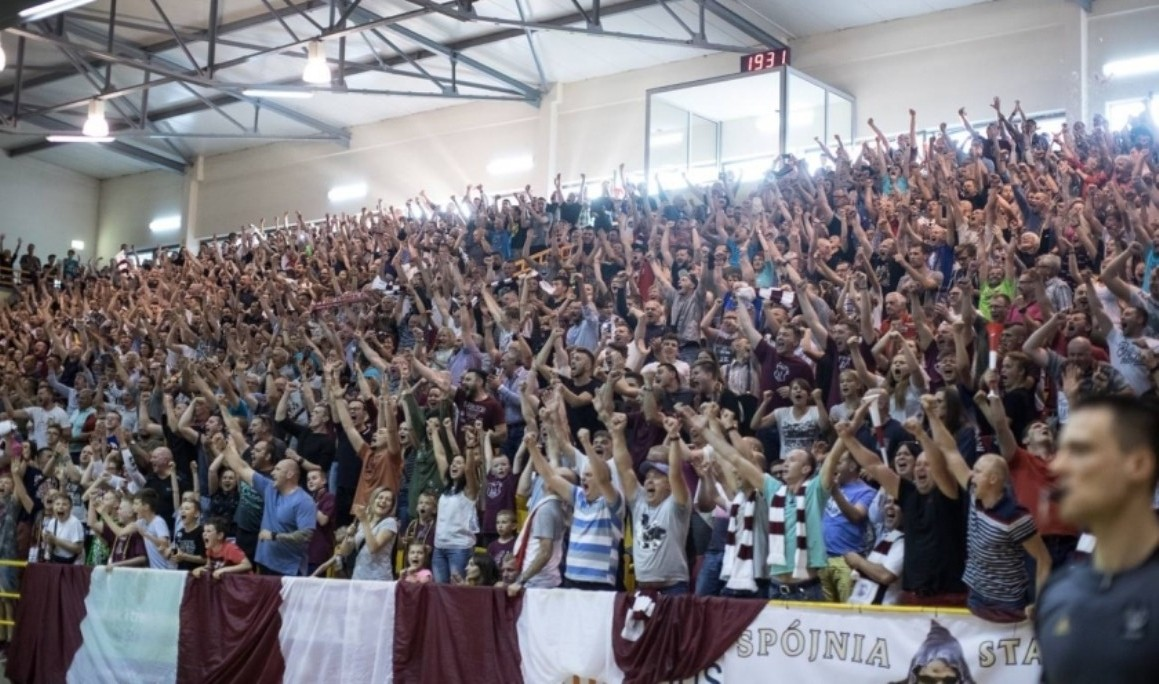 Finał. Kibice Spójni Stargard (13.05.2018)